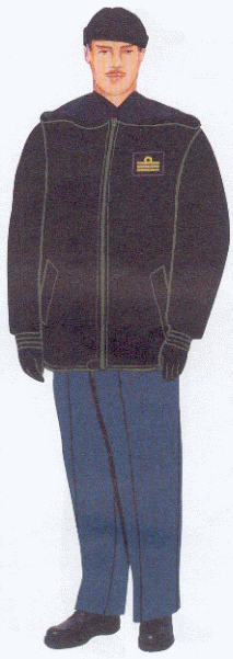 Rysunek ten pochodzi z załącznika do rozporządzenia ministra obrony narodowej z dnia 2 grudnia 2004 r. w sprawie wzorów oraz noszenia umundurowania i oznak wojskowych przez żołnierzy zawodowych i kandydatów na żołnierzy zawodowych.